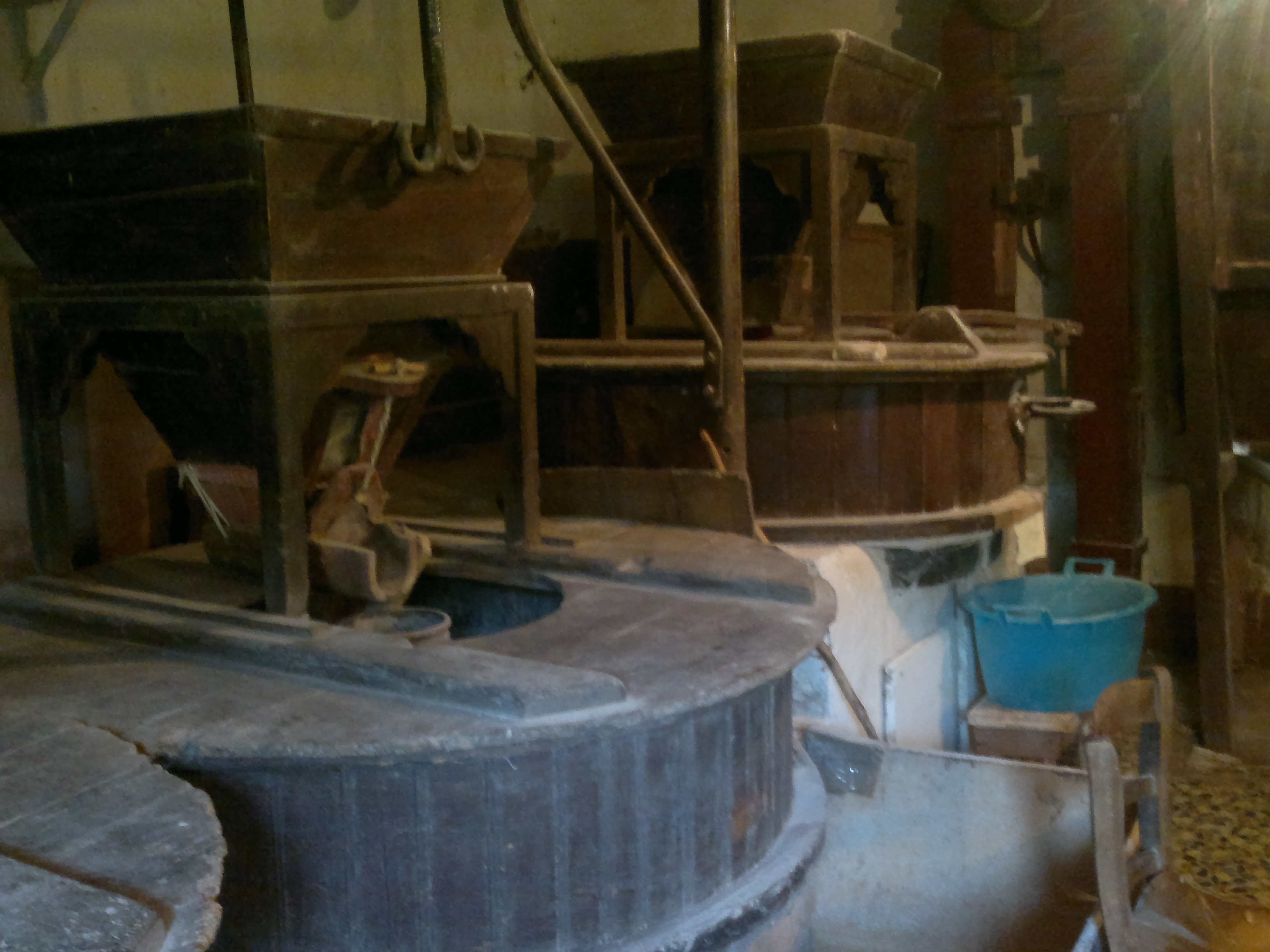 Il mulino ad acqua di Loro Ciuffenna